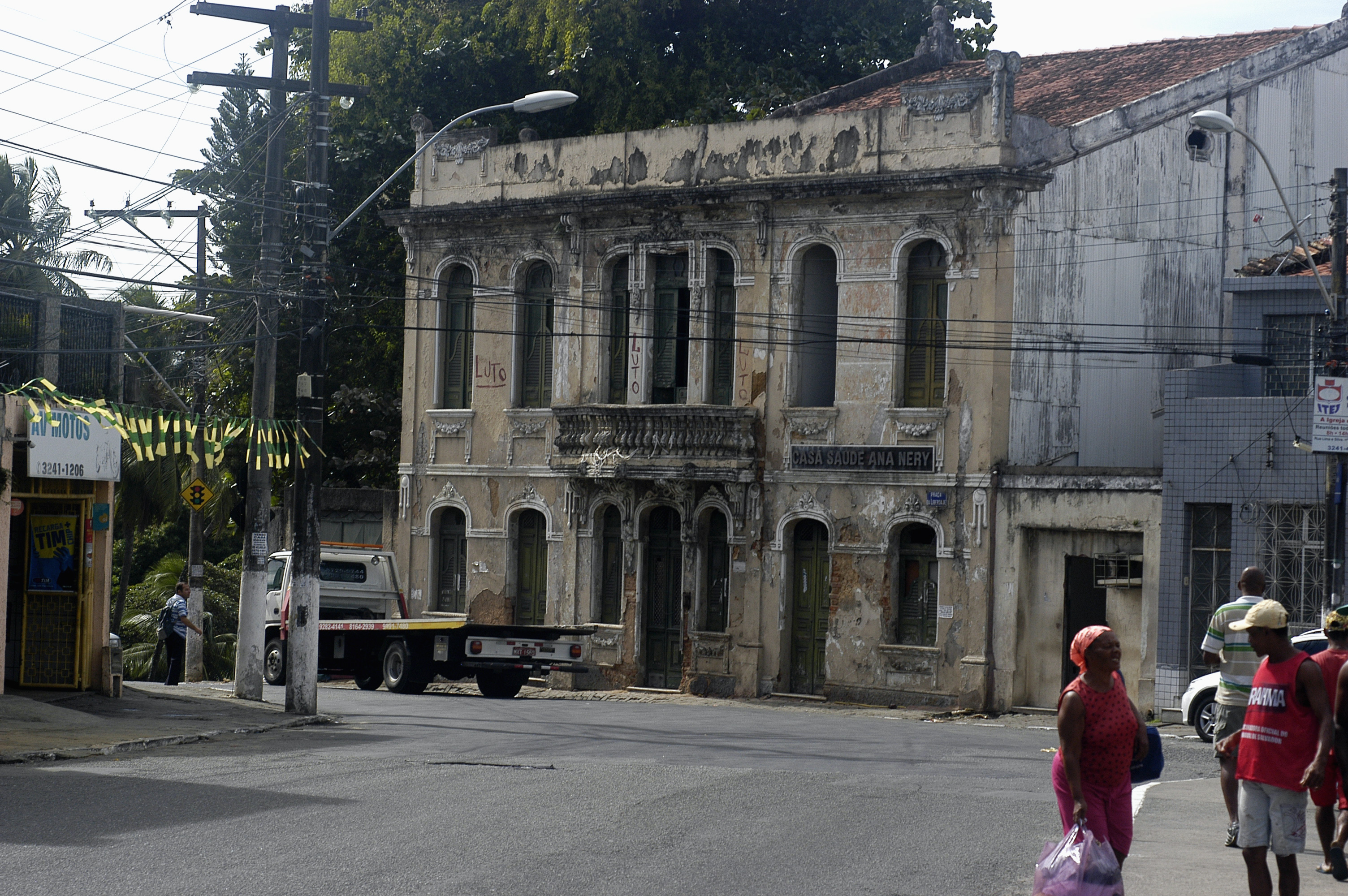 Casa de Saúde Ana Nery (hospital psiquiátrico) inaugurado em em 1966 fechado em 2005